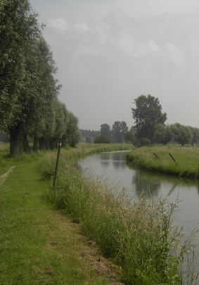 Zwalm ter hoogte van de Zwalmmolen